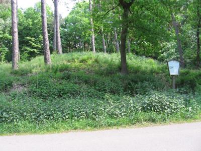 Einer von ehemals 17 Grabhügel in Erle (Nordrhein-Westfalen)